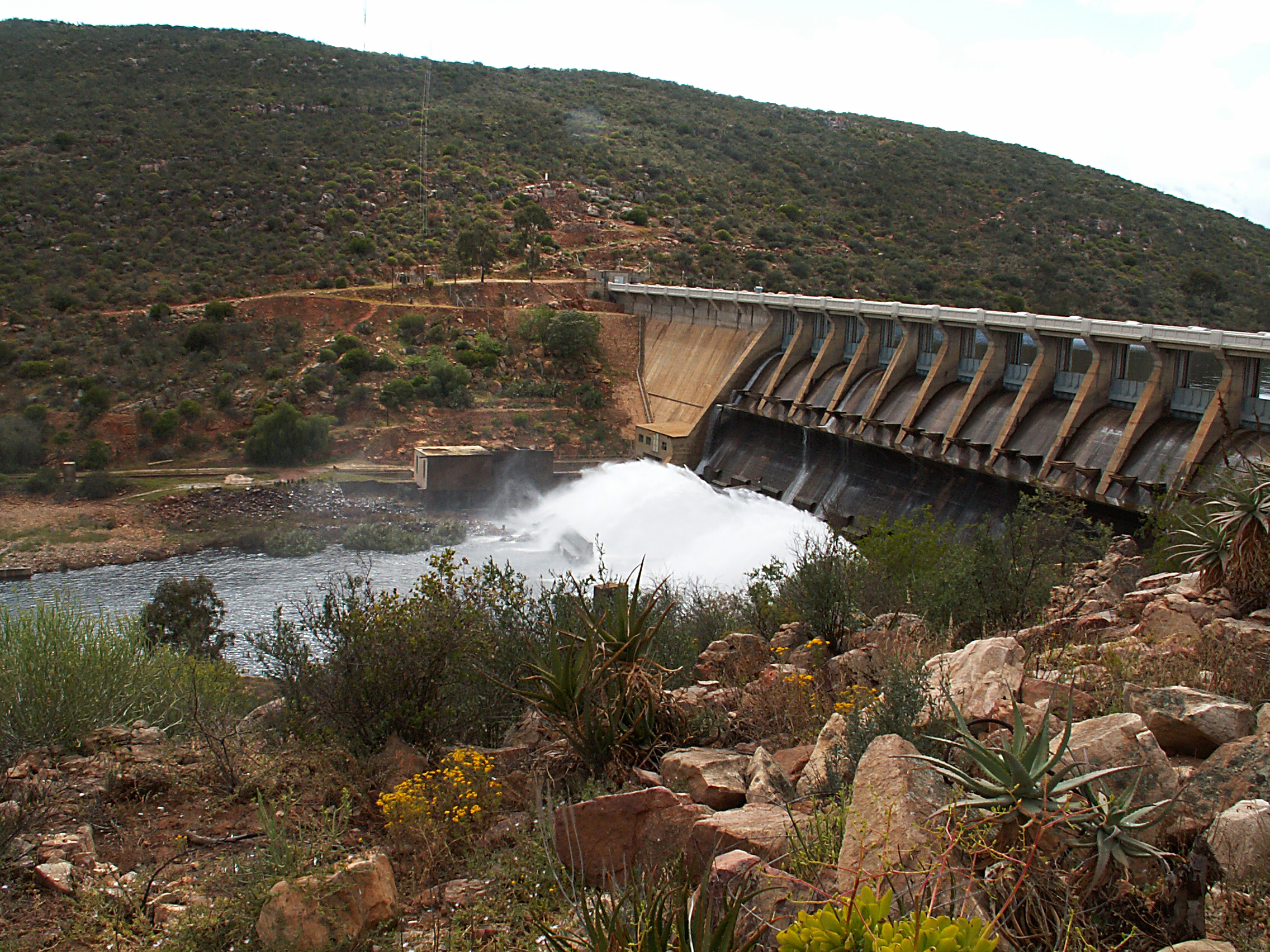 Die Clanwilliam-dam, Wes-Kaap, Suid-Afrika